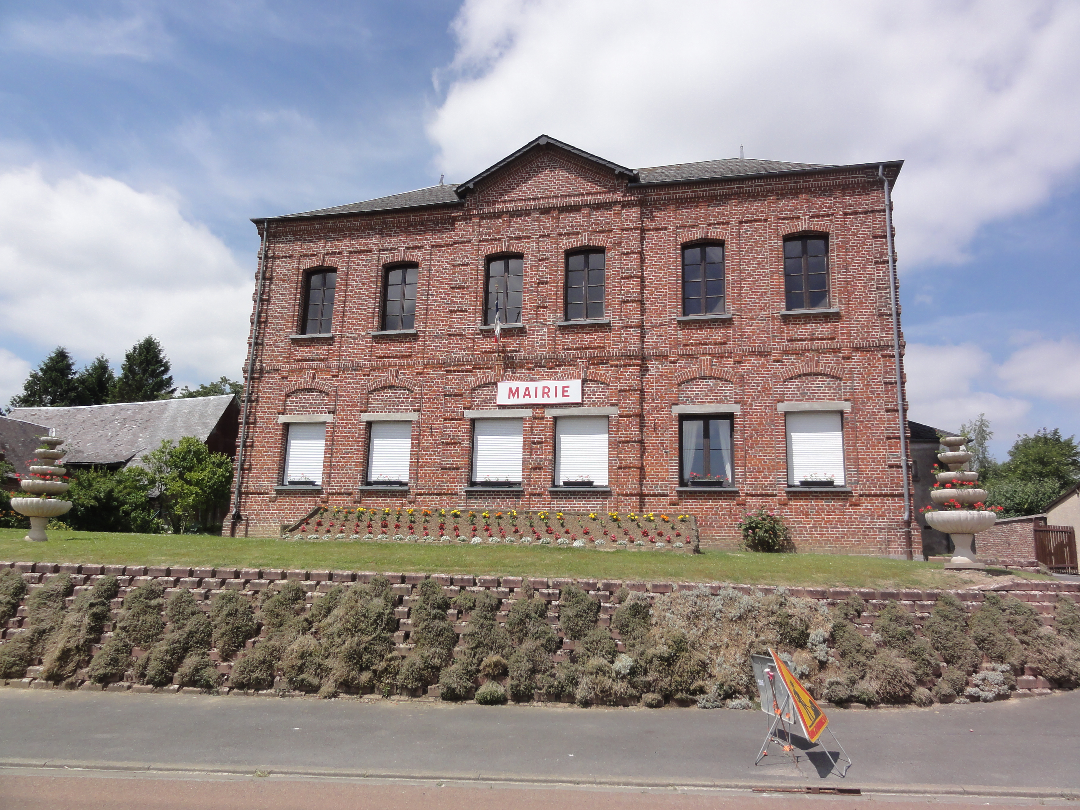 La Neuville-lès-Dorengt (Aisne) mairie